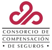 Logotipo del Consorcio de Compensación de Seguros. "Los contenidos de este sitio web son propiedad del Consorcio. Su consulta es libre y gratuita, permitiéndose la descarga de documentos y la copia de las páginas siempre que se cite la fuente y la fecha de la descarga o copia, y a condición de que no se alteren ni manipulen los contenidos. En ningún caso queda autorizada la comercialización por terceros de cualquier contenido de la web, cualesquiera que sean el formato o el tipo de distribución."